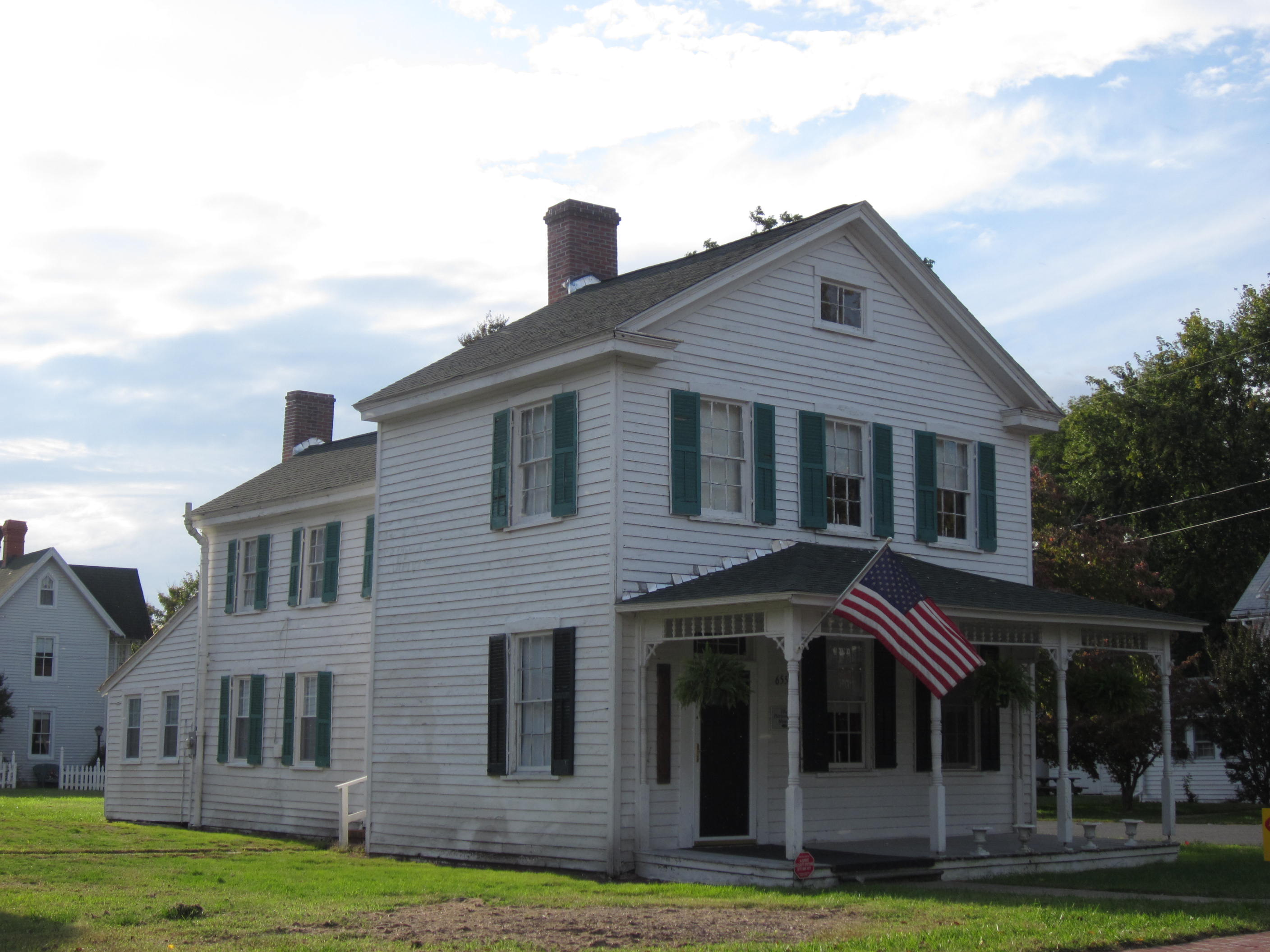 Quantico, Maryland